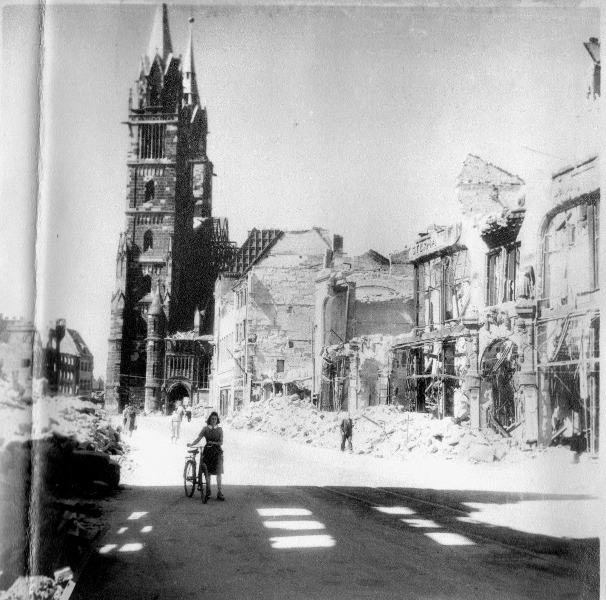 Nürnberg 1945 - Königsstraße